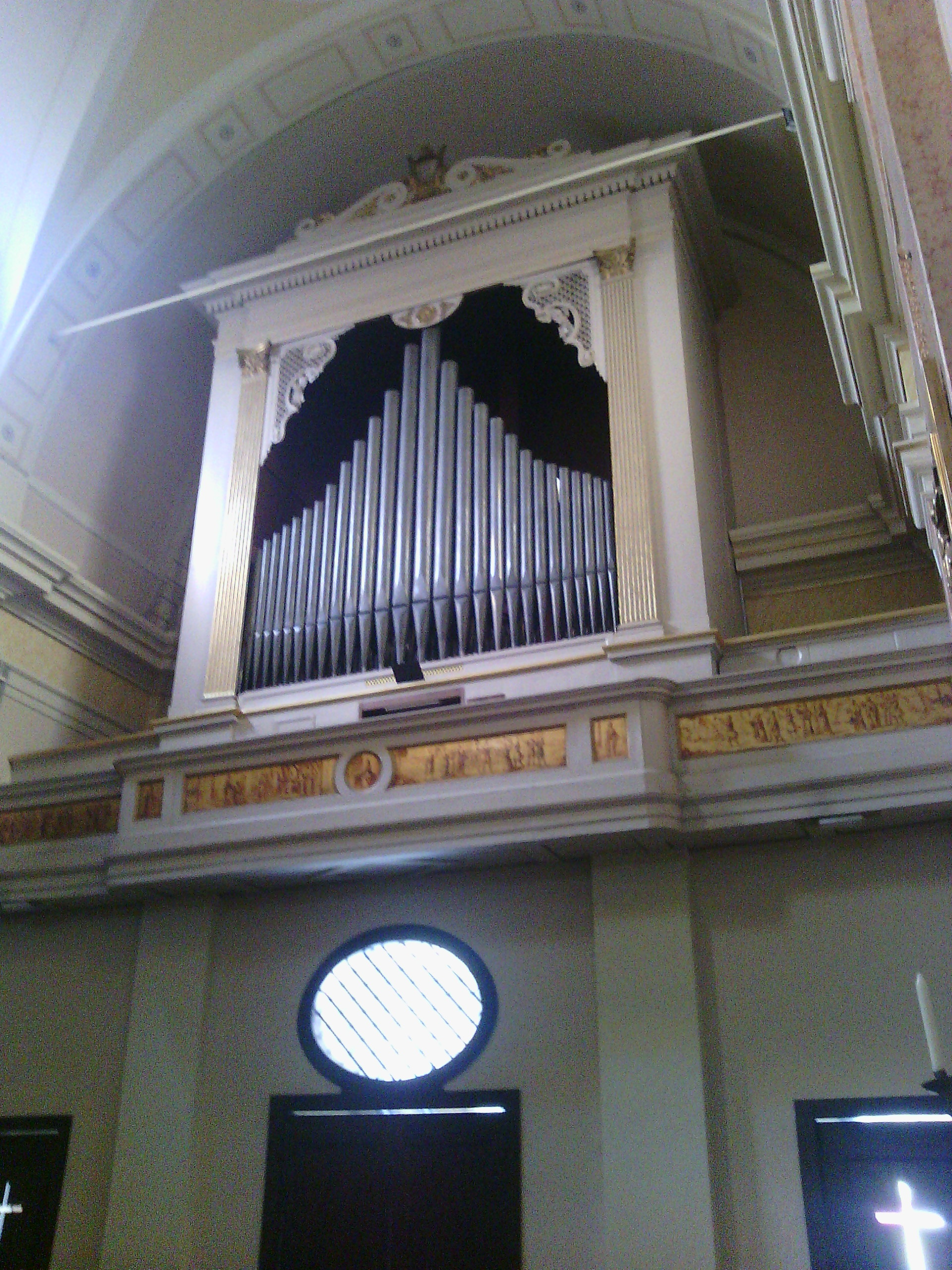 Organo della chiesa parrocchiale di Marcallo con Casone (MI) - Italy